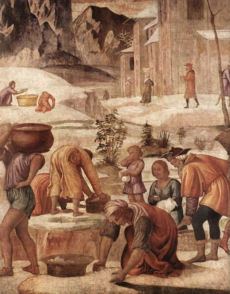 198 x 182 cm